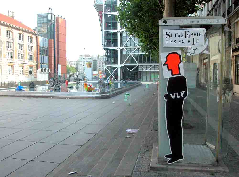 Collage beaubourg